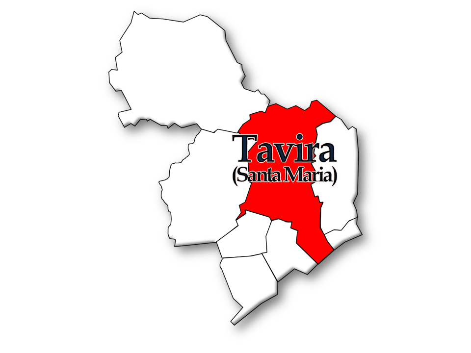 Censos 1864/2011